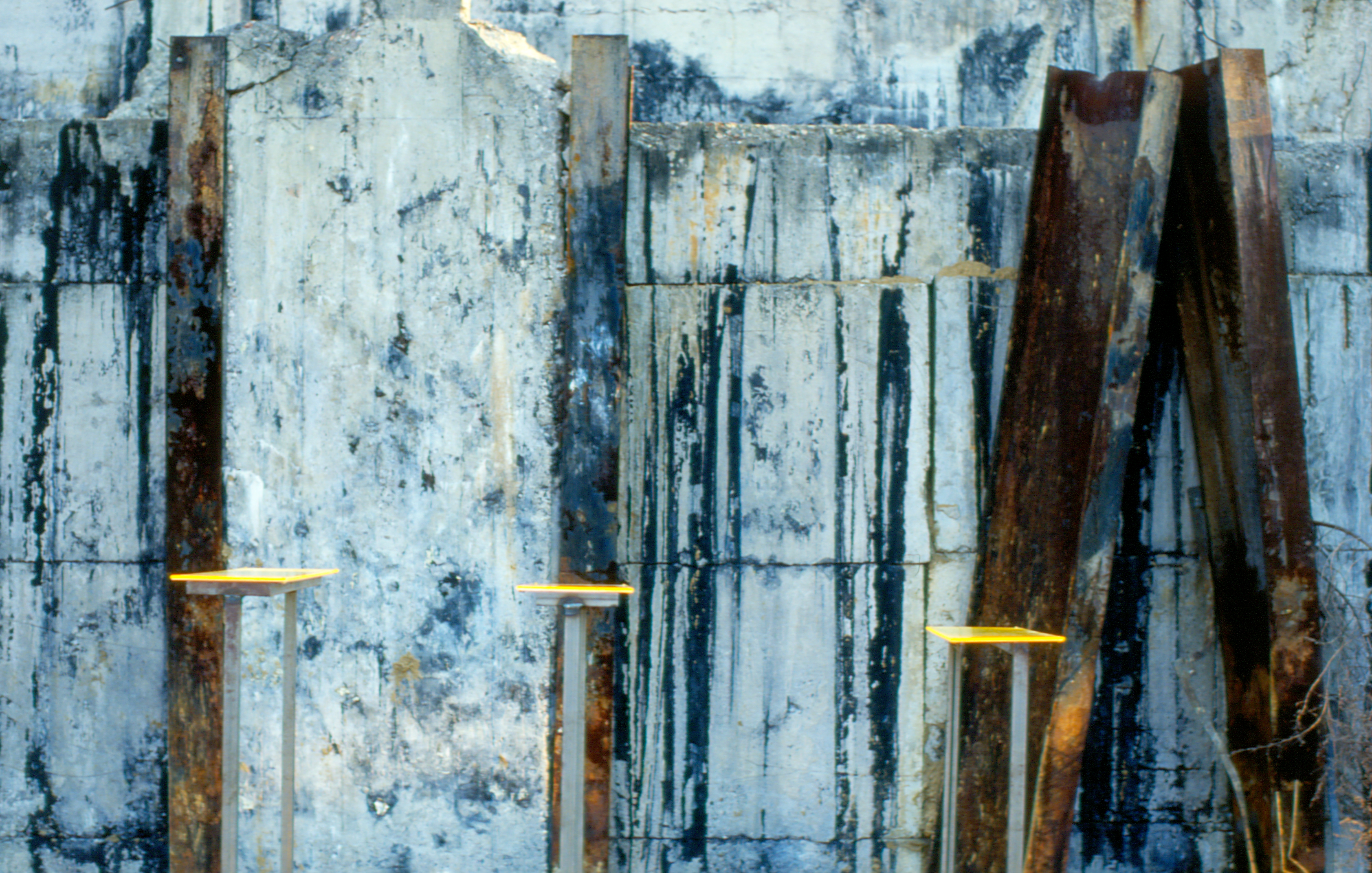 Plexiglasarbeit